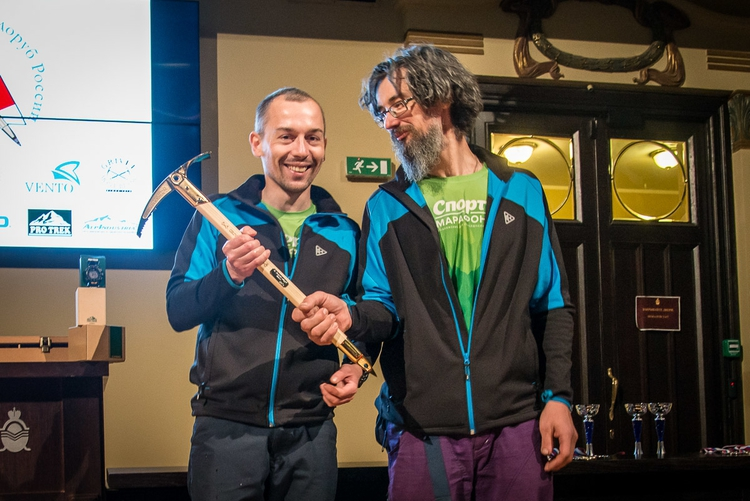 Piolet d’Or 2017. Сергей Нилов и Дмитрий Головченко.